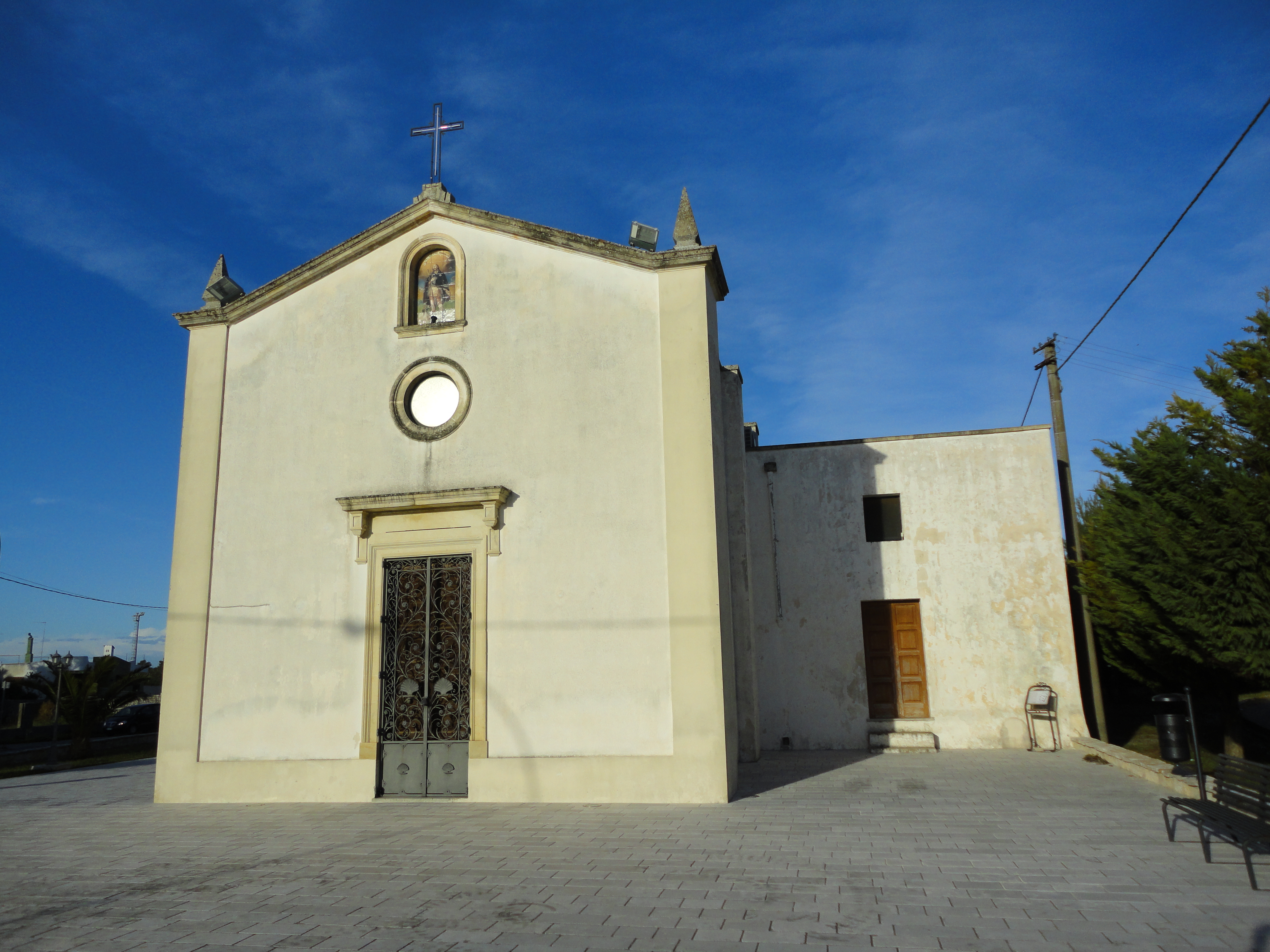 Cappella di San Rocco Surano, Lecce